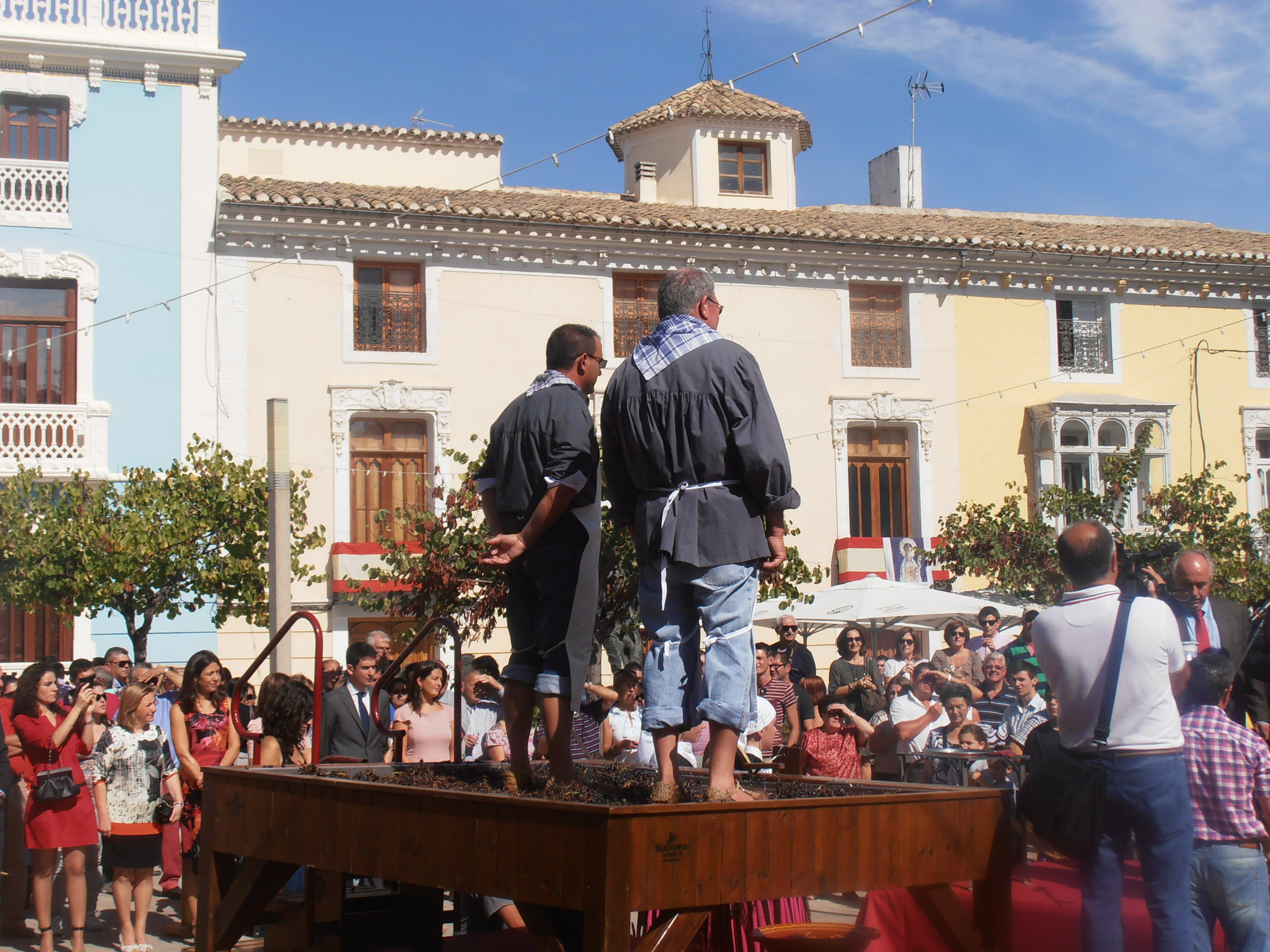 primer domingo de octubre, pisada de la uva y primer mosto